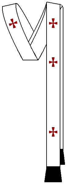 Paliusz Benedykta XVI w stylu wschodnim.